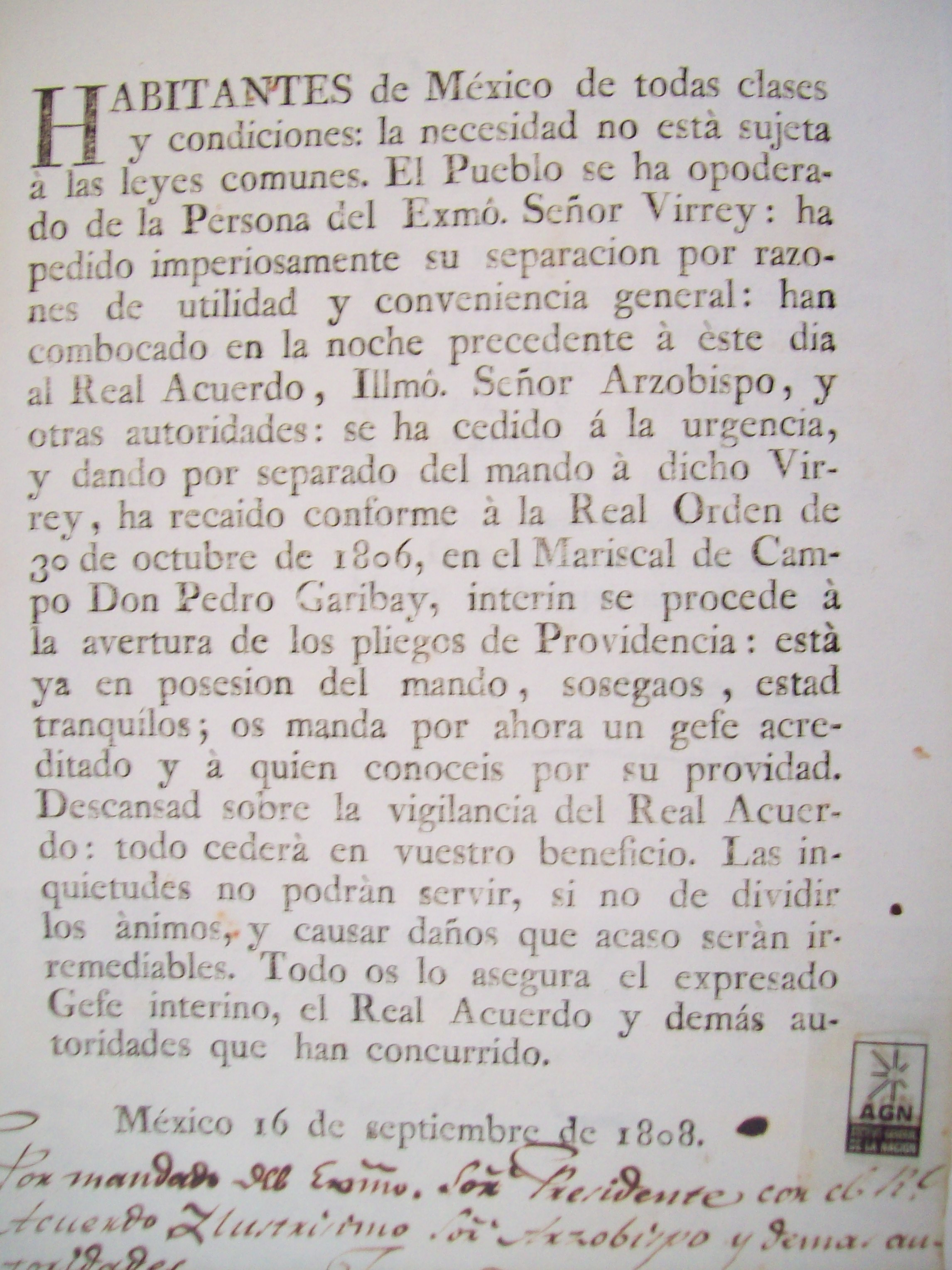 Bando de Garibay del 16 de septiembre de 1808, avisando la deposición de José de Iturrigaray. Archivo General de la Nación de México. Fuente: Memoria de las revoluciones de México. (2009) ISBN 978-607-7748-04-5